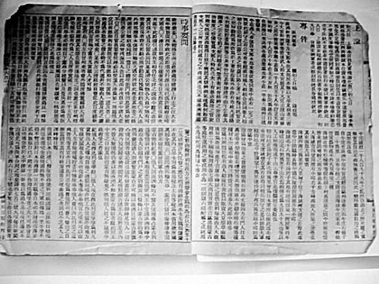 《嶺東日報》內部版面（第八版）